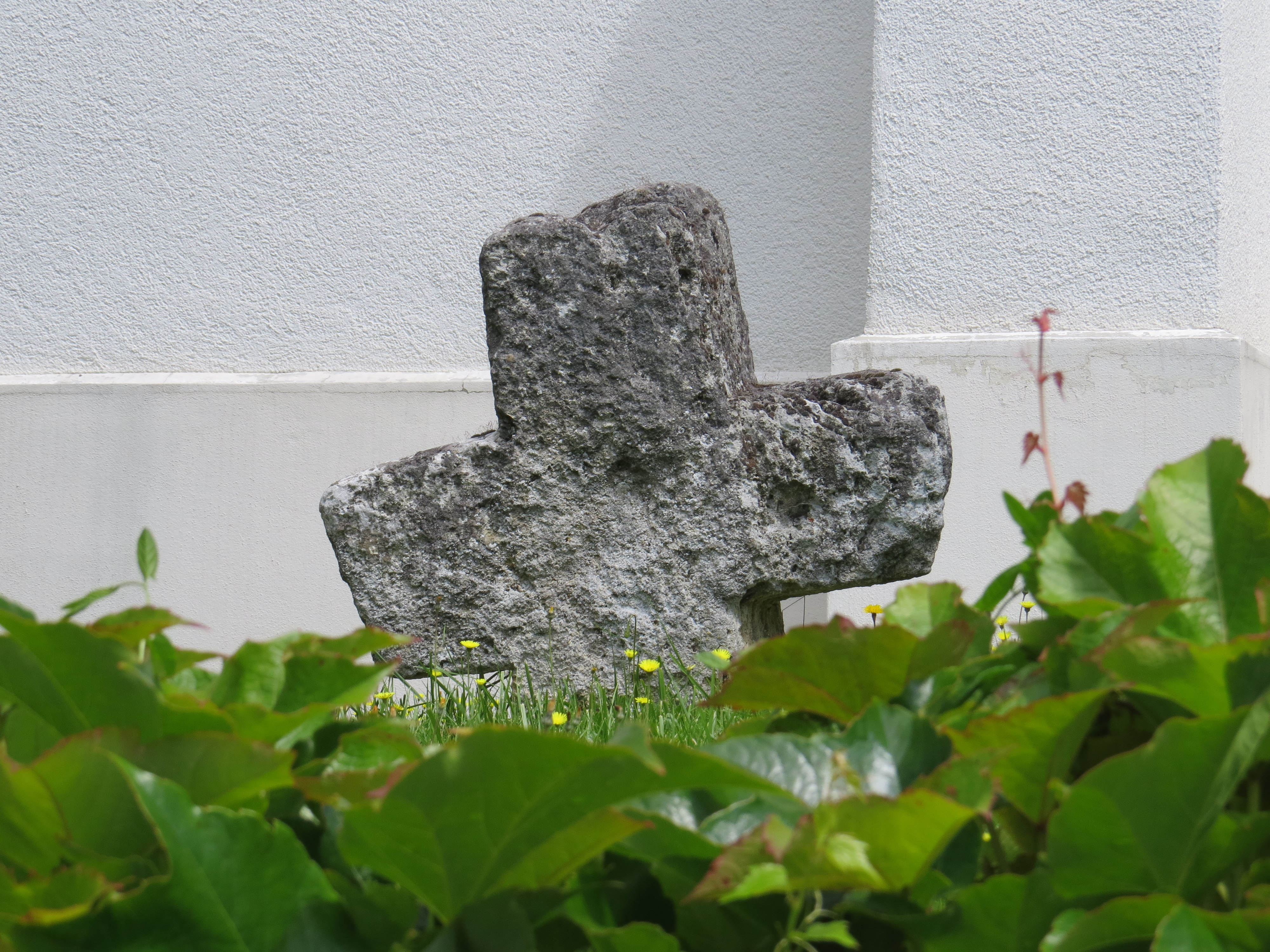 Steinkreuz bei der Kirche in Bühl, Bibertal